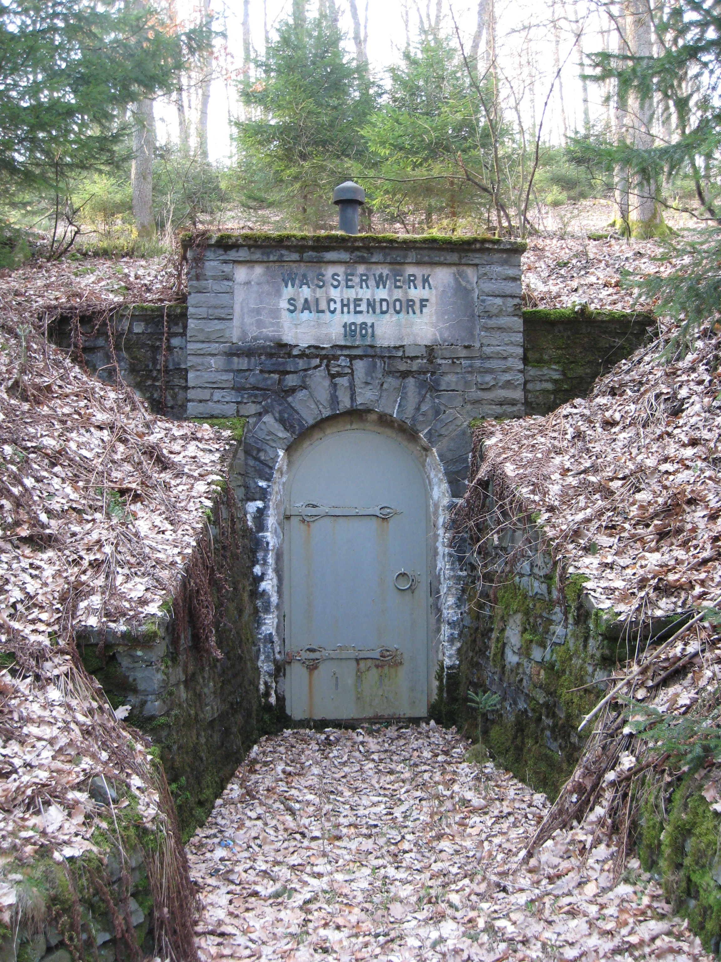 1961 erbautes Wasserwerk in Salchendorf (Neunkirchen, Siegerland); ehemaliger Stollen der Grube Rausche